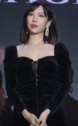 MIN tại một sự ở Thành phố Hồ Chí Minh vào ngày 21 tháng 3 năm 2020